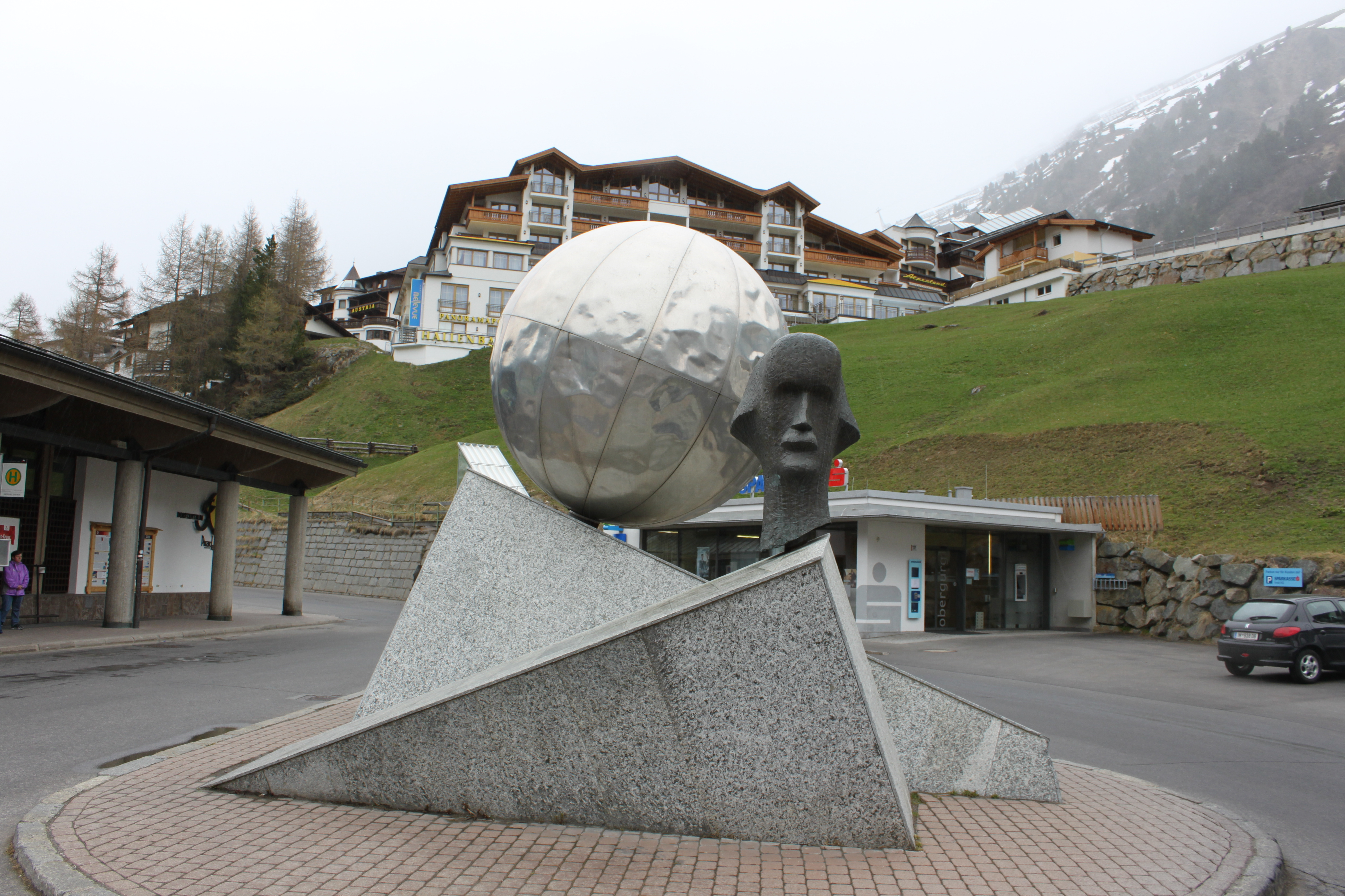 Denkmal zu Auguste Piccard in Obergurgl